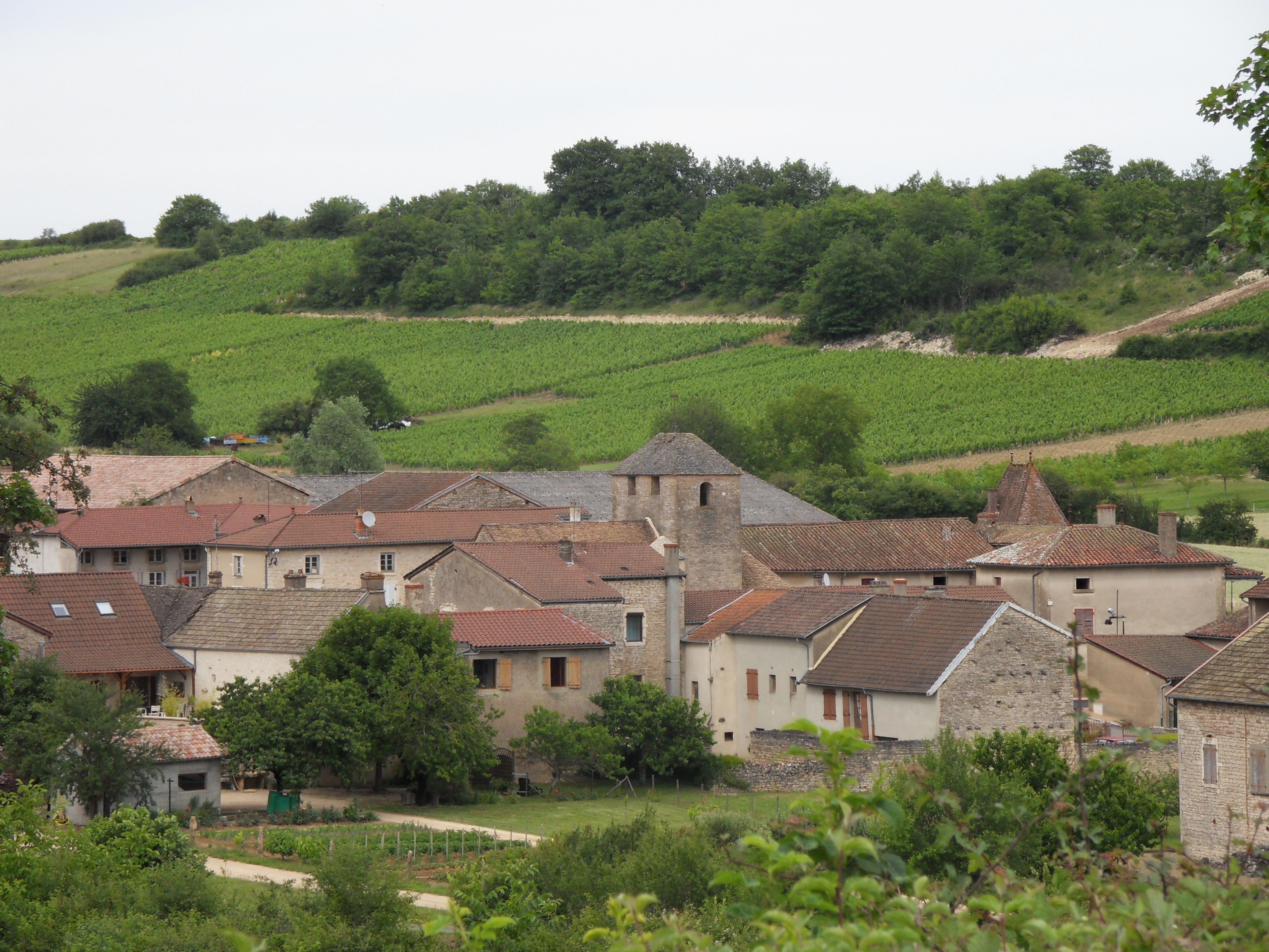 Bissy-la-Maconnaise (Saône-et-Loire)